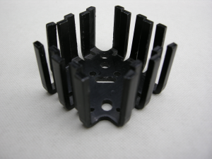 Koelplaat met koelvingers, voor componenten in een TO-220 en TO-3 omhulling.